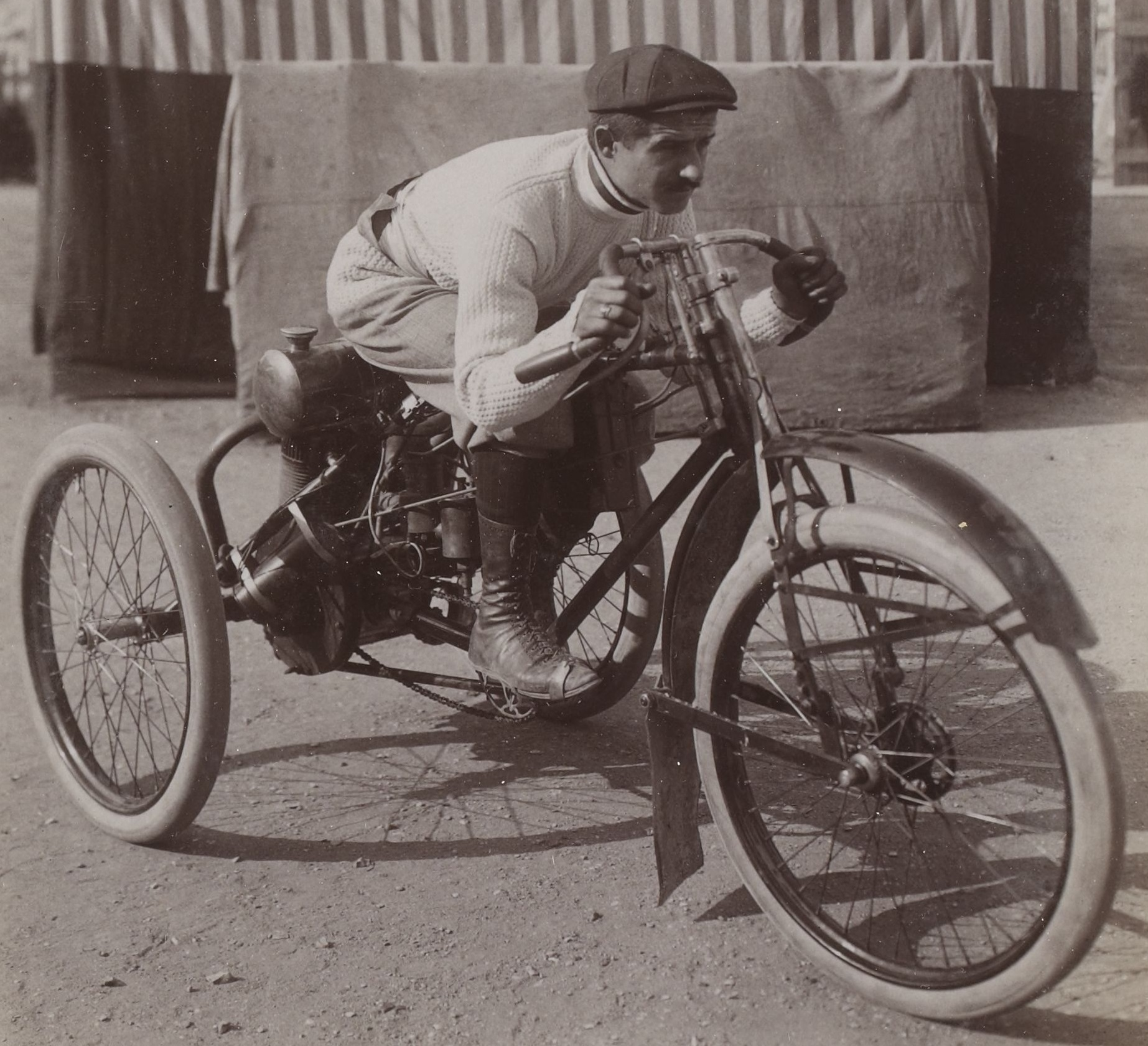 [Collection Jules Beau. Photographie sportive] : T. 14. Année 1901 / Jules Beau : F. 10. [Grand Prix cycliste de la République, 23, 27, 30 juin 1901]